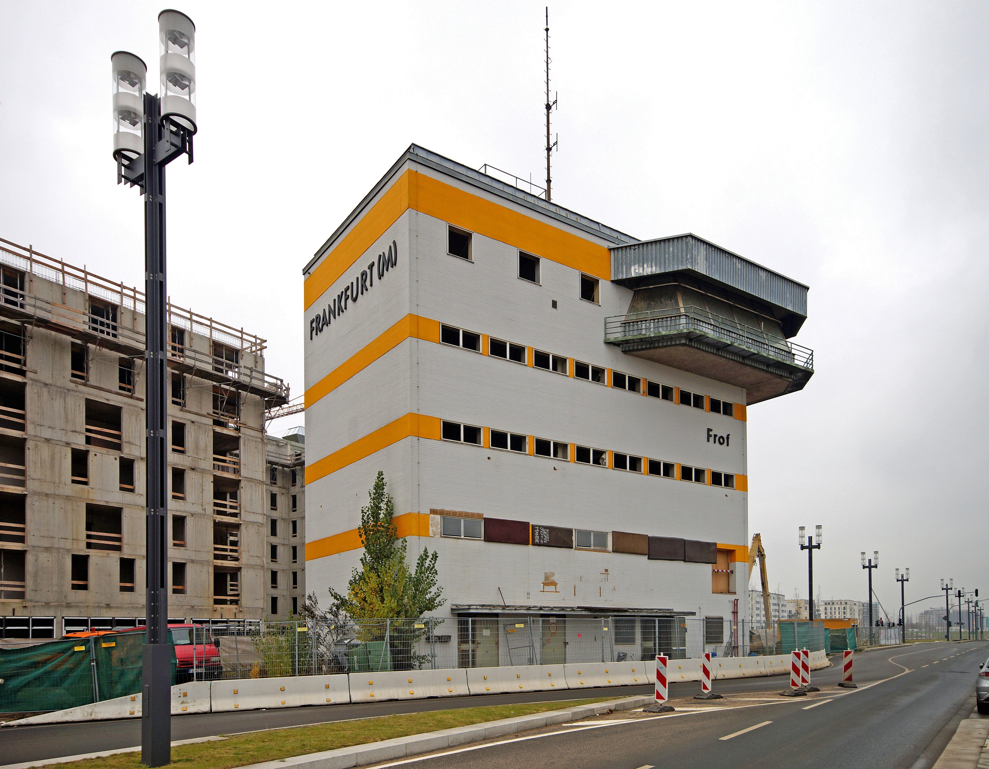 Das Stellwerksgebäude Frof (Frankfurt Rangierbahnhof Ostseite Fahrdienstleiter) des ehemaligen Hauptgüterbahnhofs von Frankfurt am Main. Es ist das letzte große Erinnerungsmonument an den Hauptgüterbahnhof. Die Aufnahme entstand einen Tag vor Beginn der Abrissarbeiten des Stellwerksgebäudes.